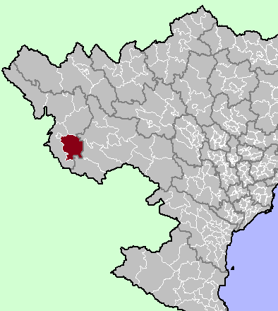 Dien Bien Dong District, Dien Bien Province, Vietnam.